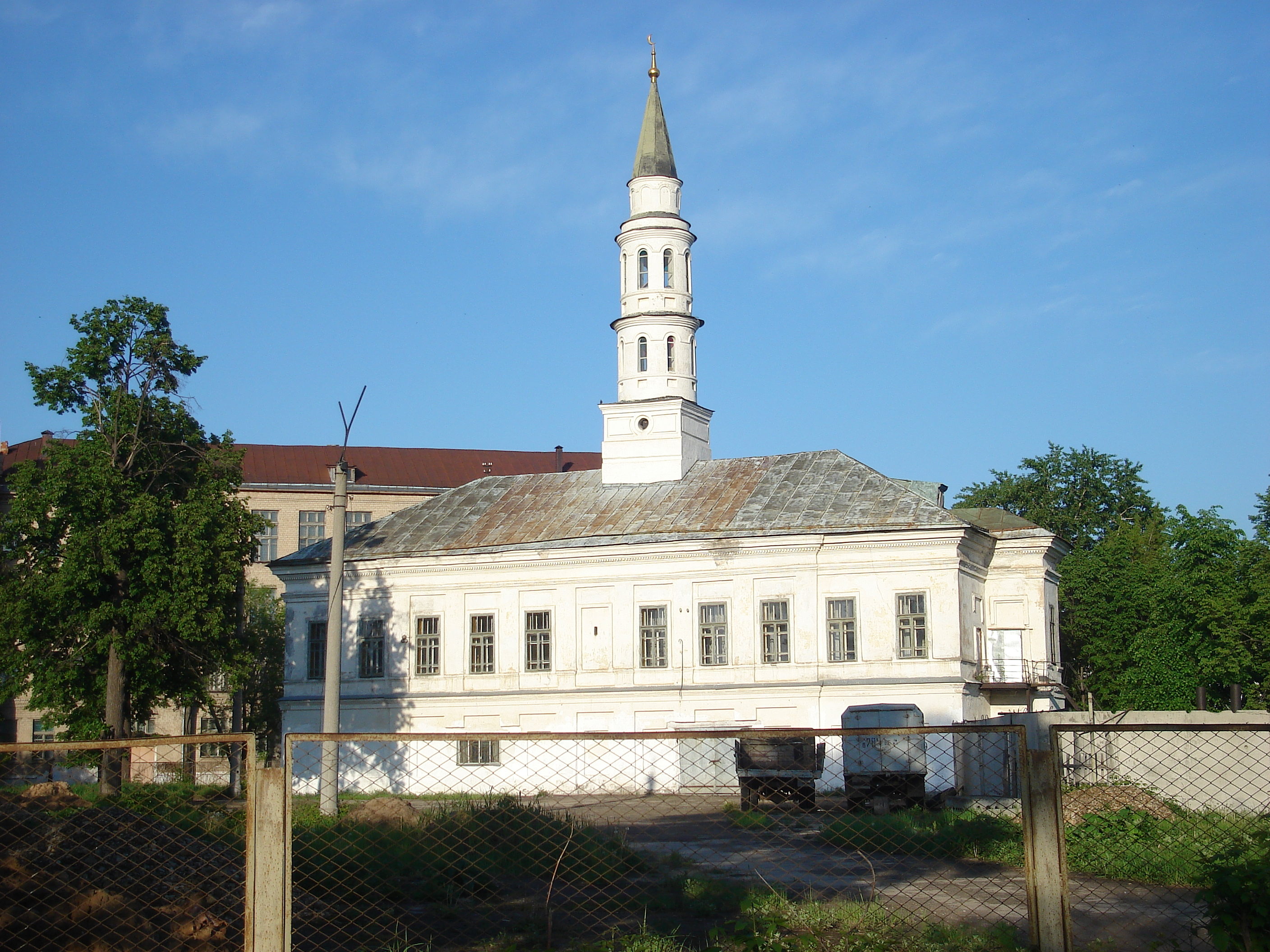 Iske Tash Mosque, kazan